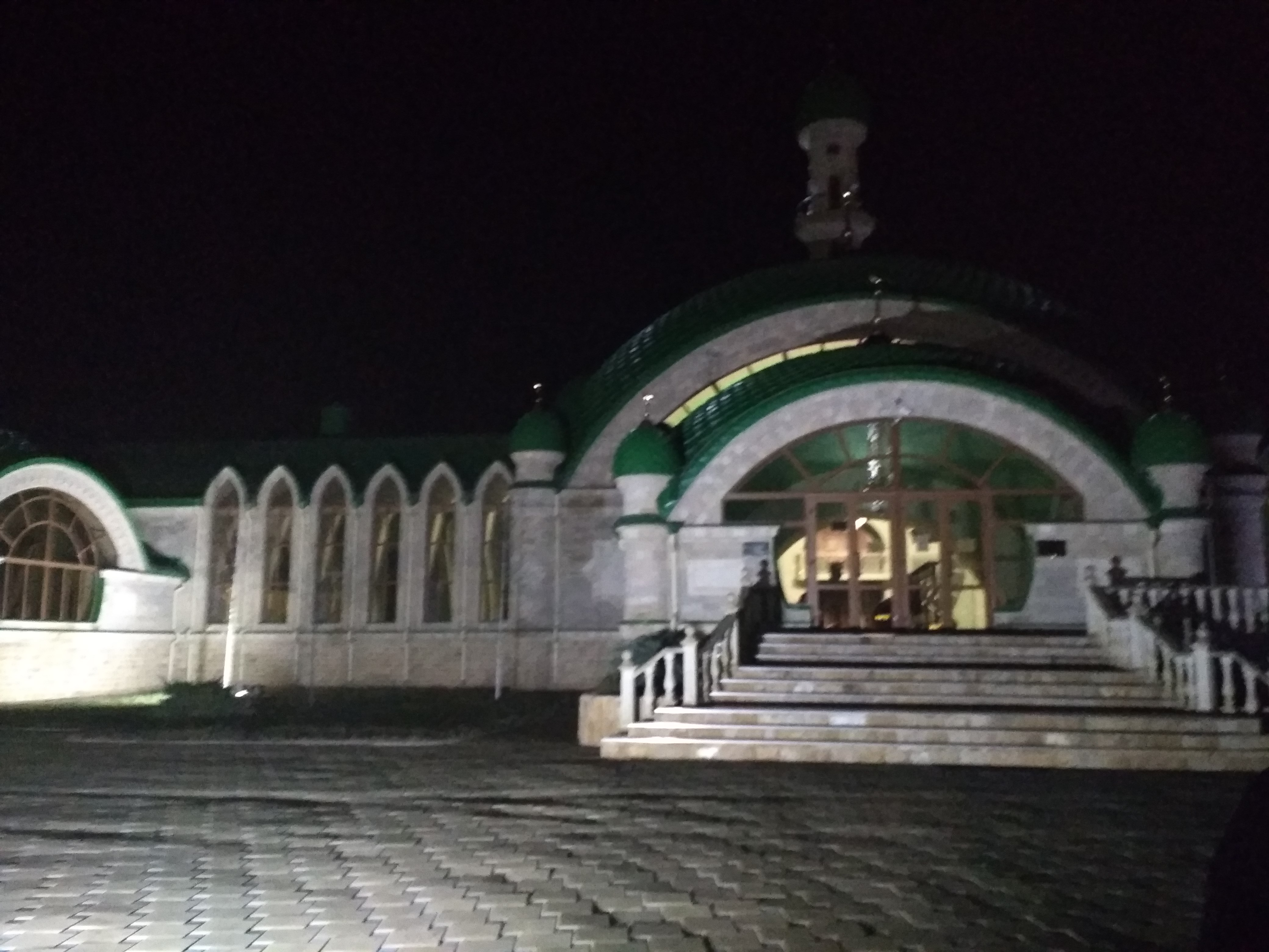 Нохчийн: ЧӀуьлга-Юртара керла маьждиг